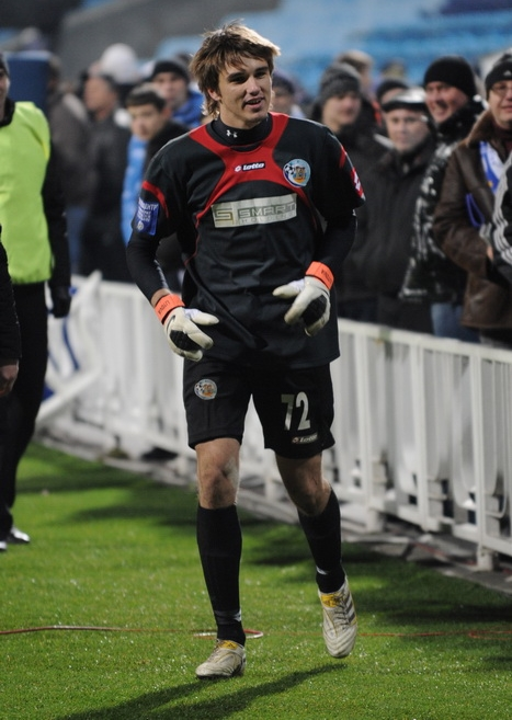 Игорь Юрьевич Литовка — украинский футболист, вратарь.